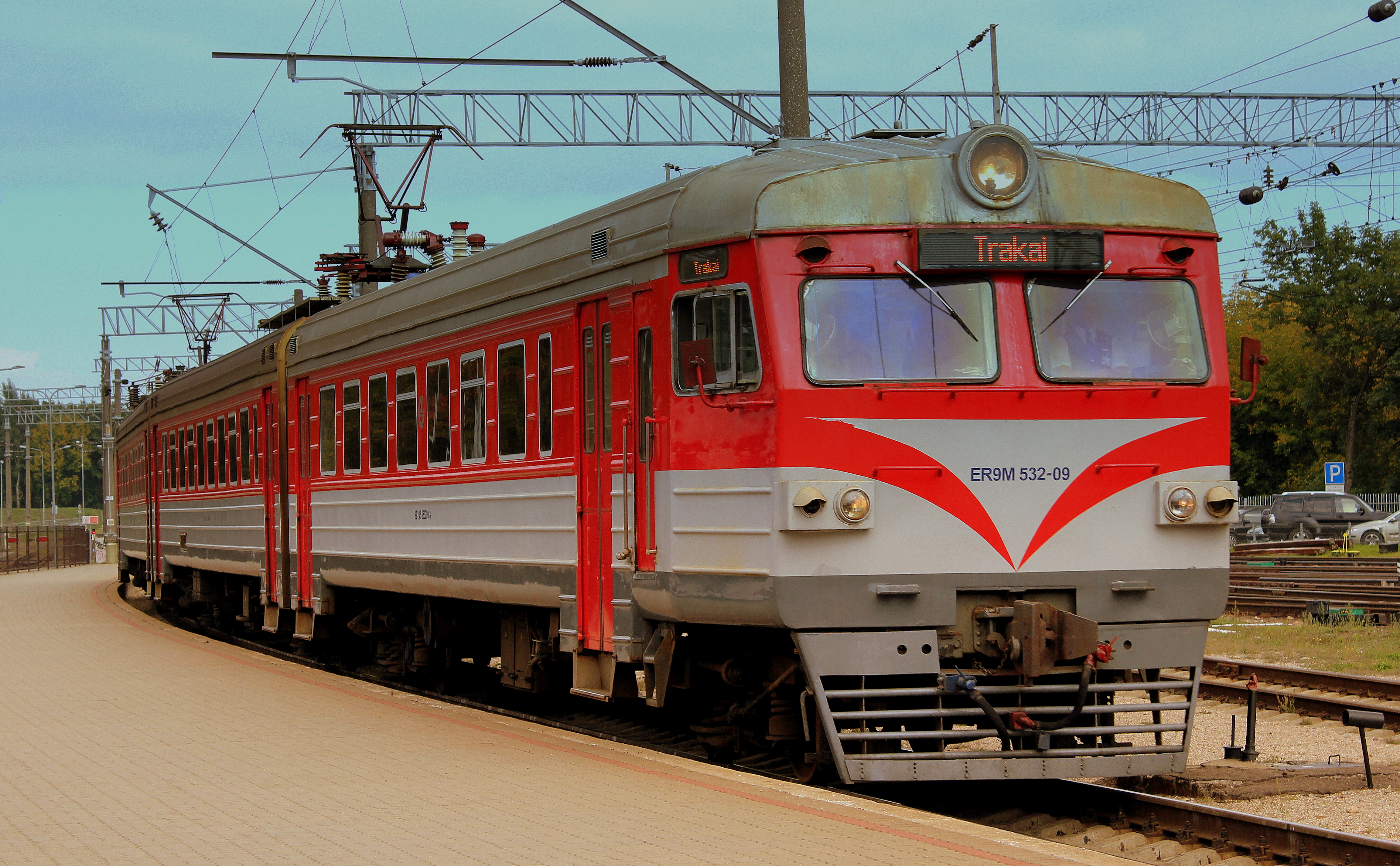 LITHUANIAN RAILWAYS EMU TRAIN BOUND FOR TRAKKAI AT VILLINUS RAILWAY STATION LITHUANIA SEP 2013